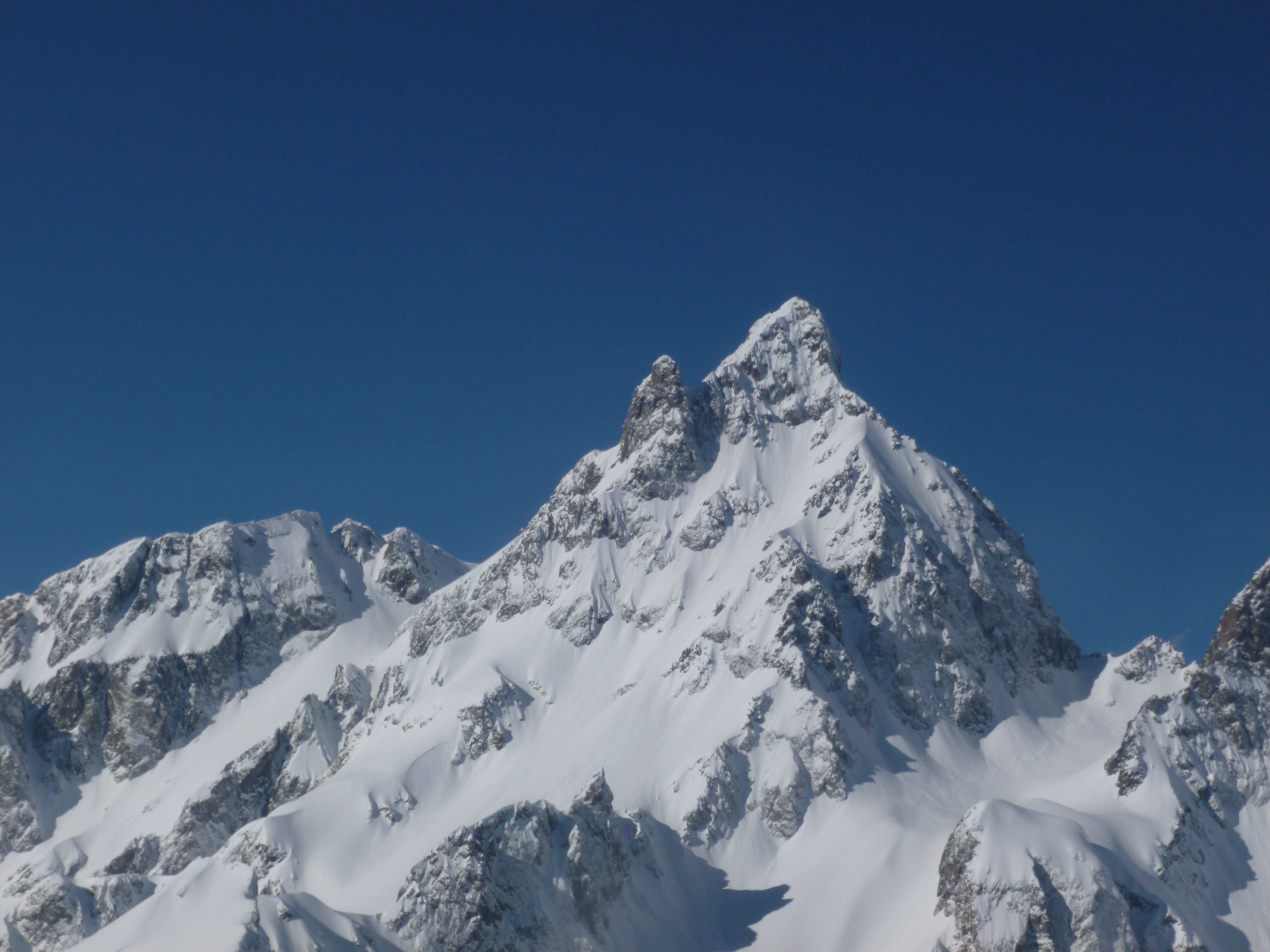 Le grand pic de Belledonne vu d'avion.